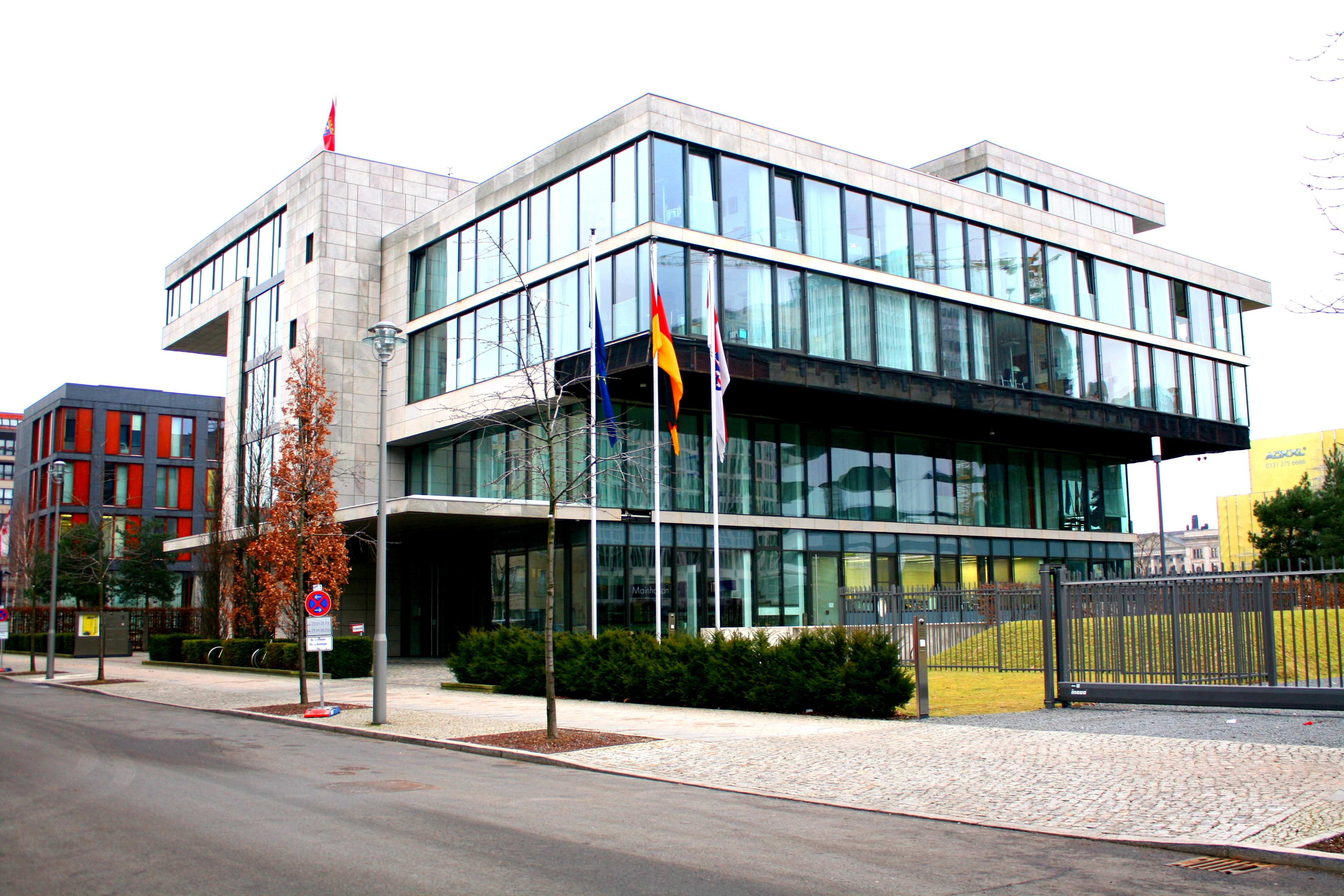 Vertretung des Landes Hessen beim Bund in den Ministergärten in Berlin